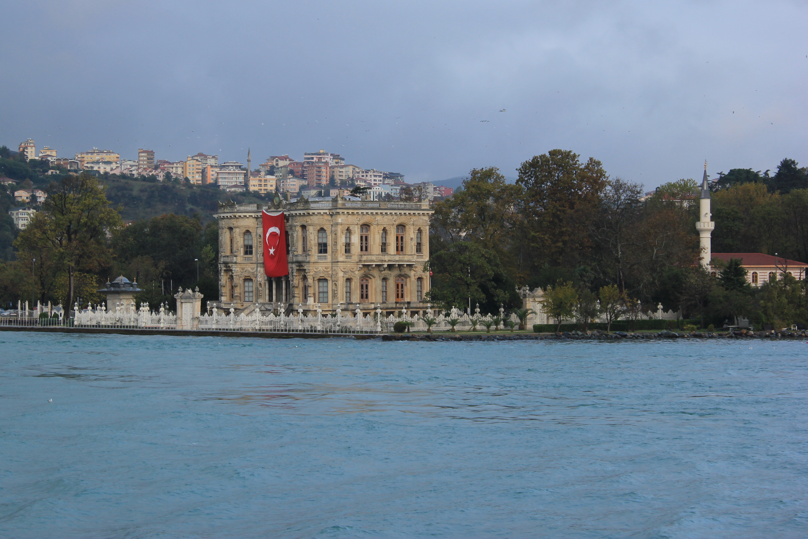 Der Küçüksu-Palast am Bosporus in Istanbul.